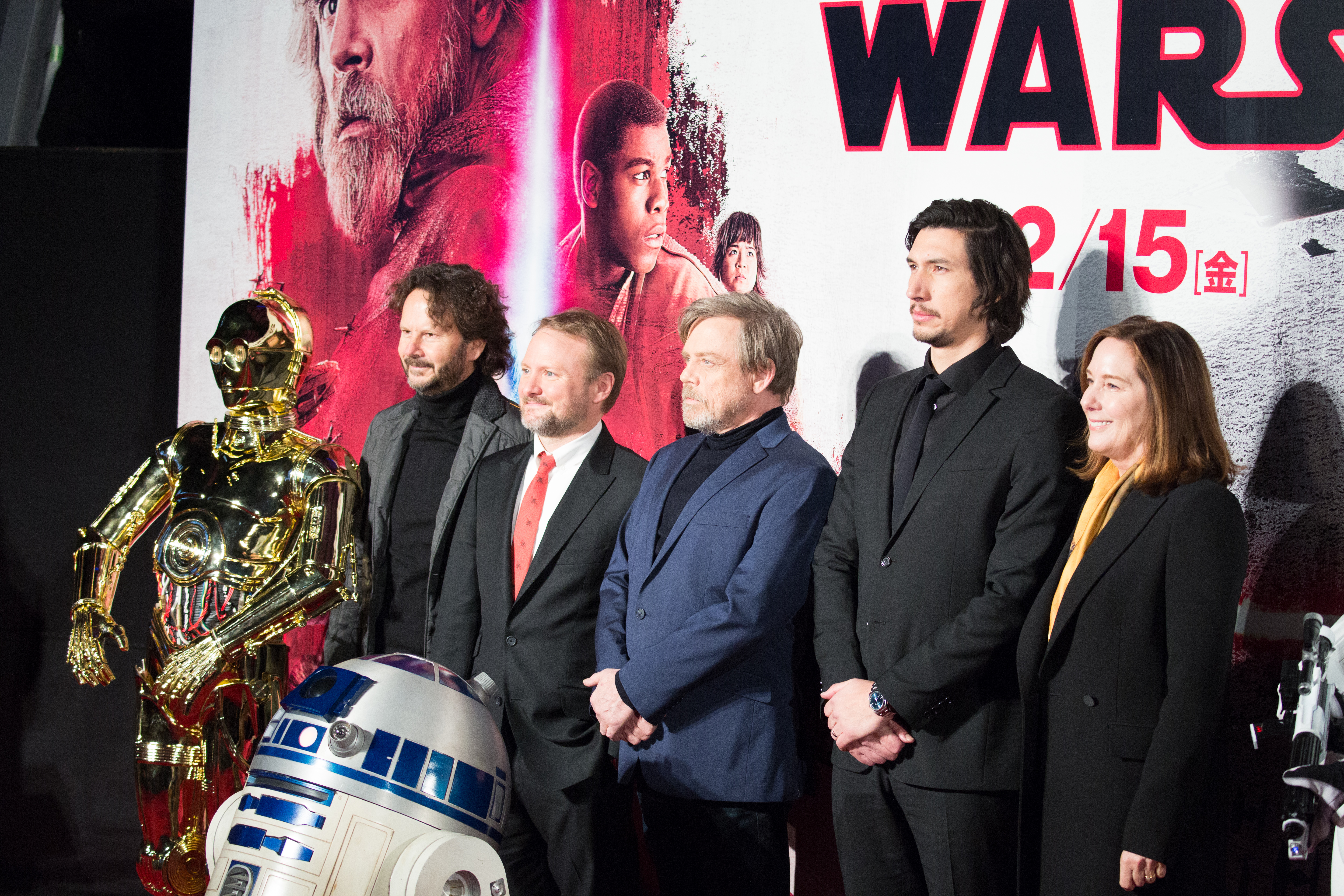 スター・ウォーズ/最後のジェダイ ジャパン・プレミア レッドカーペット ラム・バーグマン ライアン・ジョンソン マーク・ハミル アダム・ドライバー キャスリーン・ケネディ